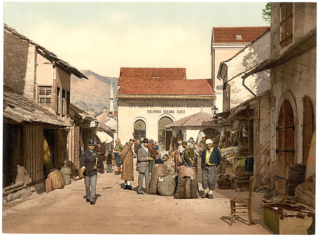 Cafe Luft in Mostar, 1890-1900